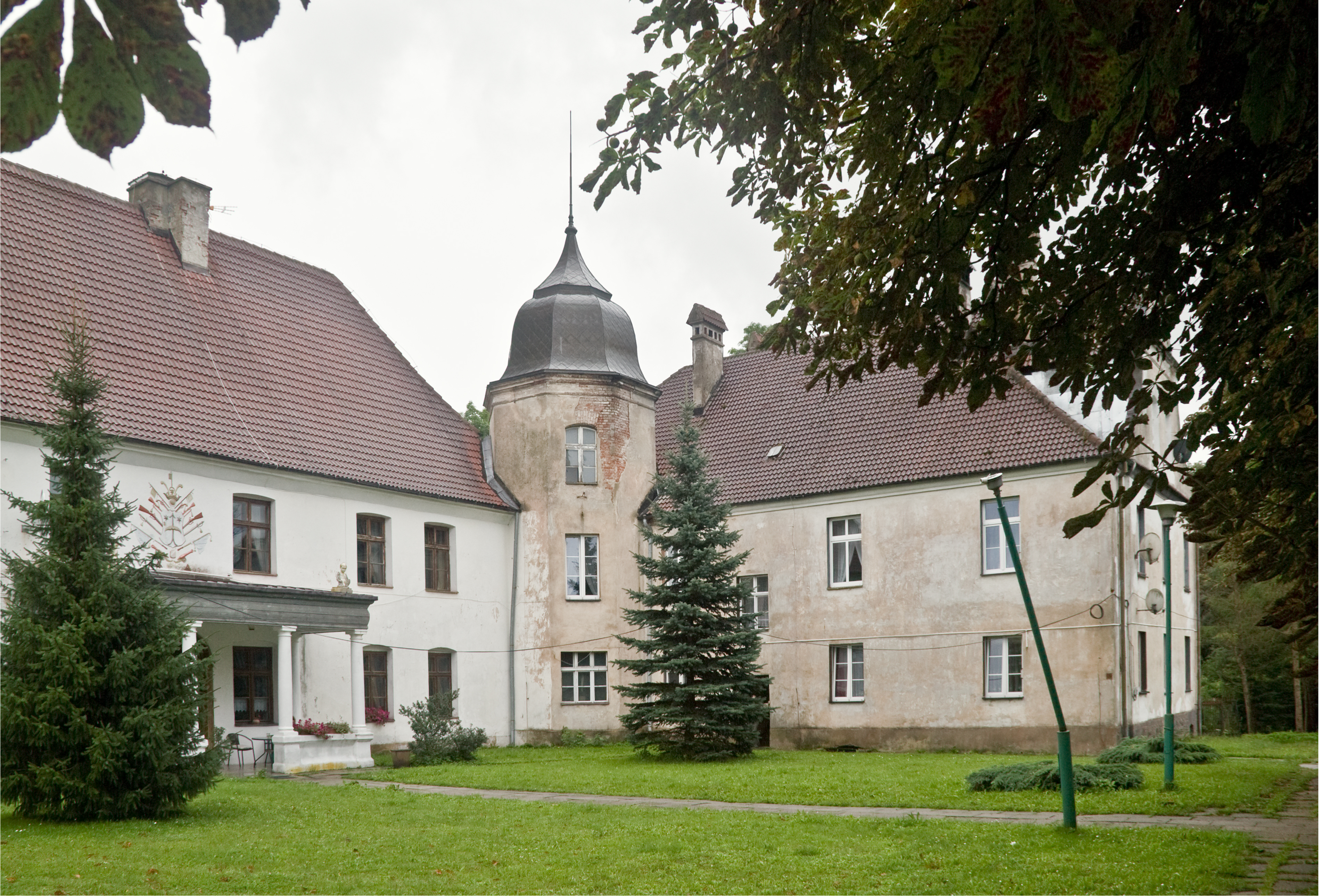 Charbrowo, pałac, 2 poł. XVII - XX